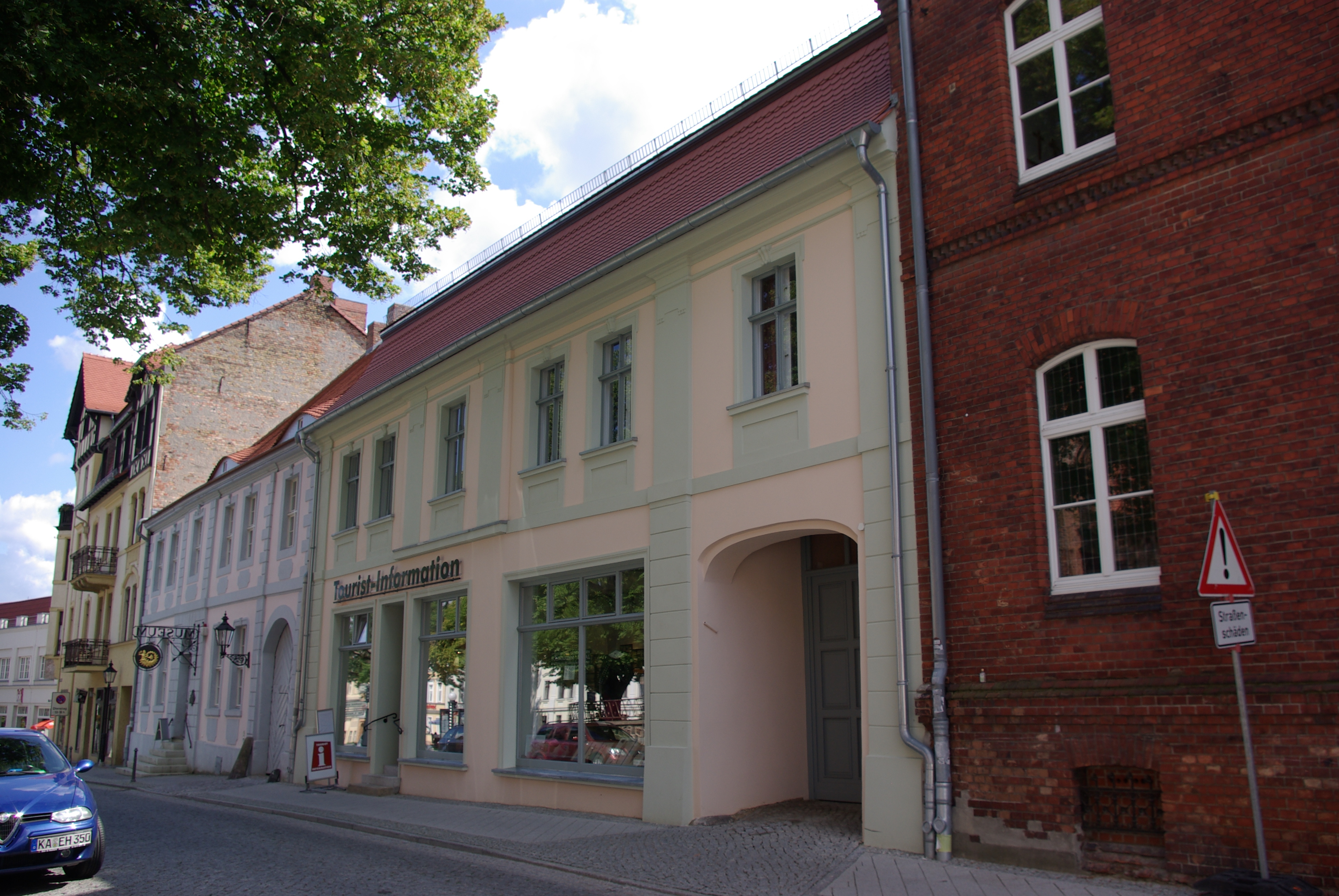 Bad Freienwalde / Oder in Brandenburg. Das Haus in der Uchtenhagenstraße 3 steht unter Denkmalschutz.